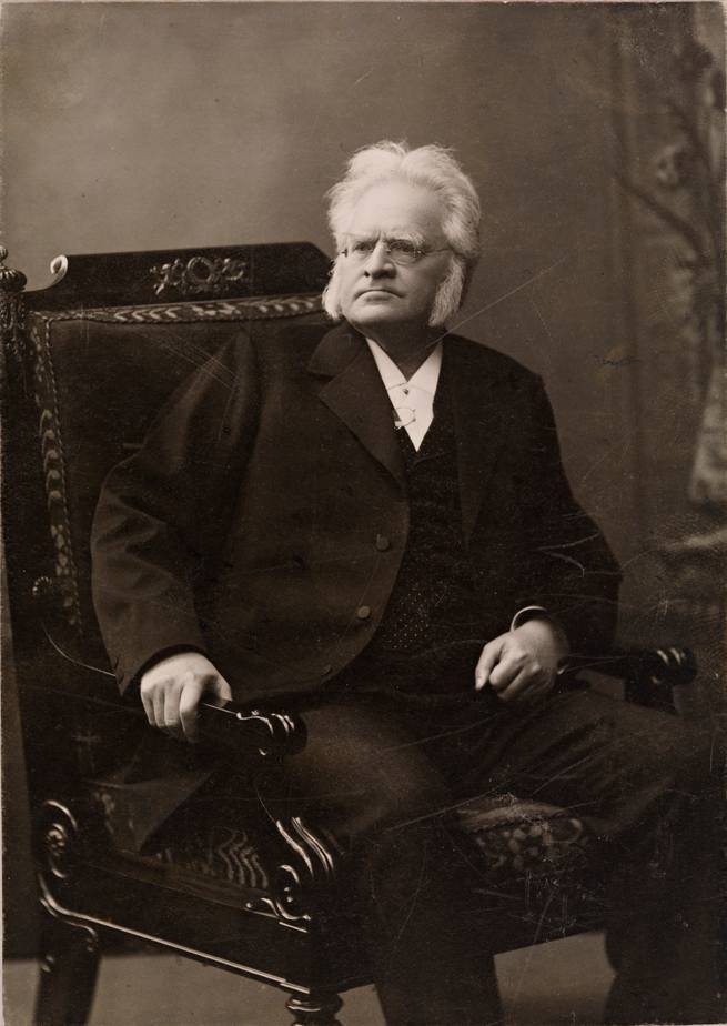 Bjørnstjerne Bjørnson, ca 1905. Dato / Date: ca 1905. Fotograf / Photographer: Gustav Borgen. Eier / Owner Institution: Nasjonalbiblioteket / National Library of Norway Lenke / Link: Bildesignatur / Image Number: no-nb_bldsa_BB0155